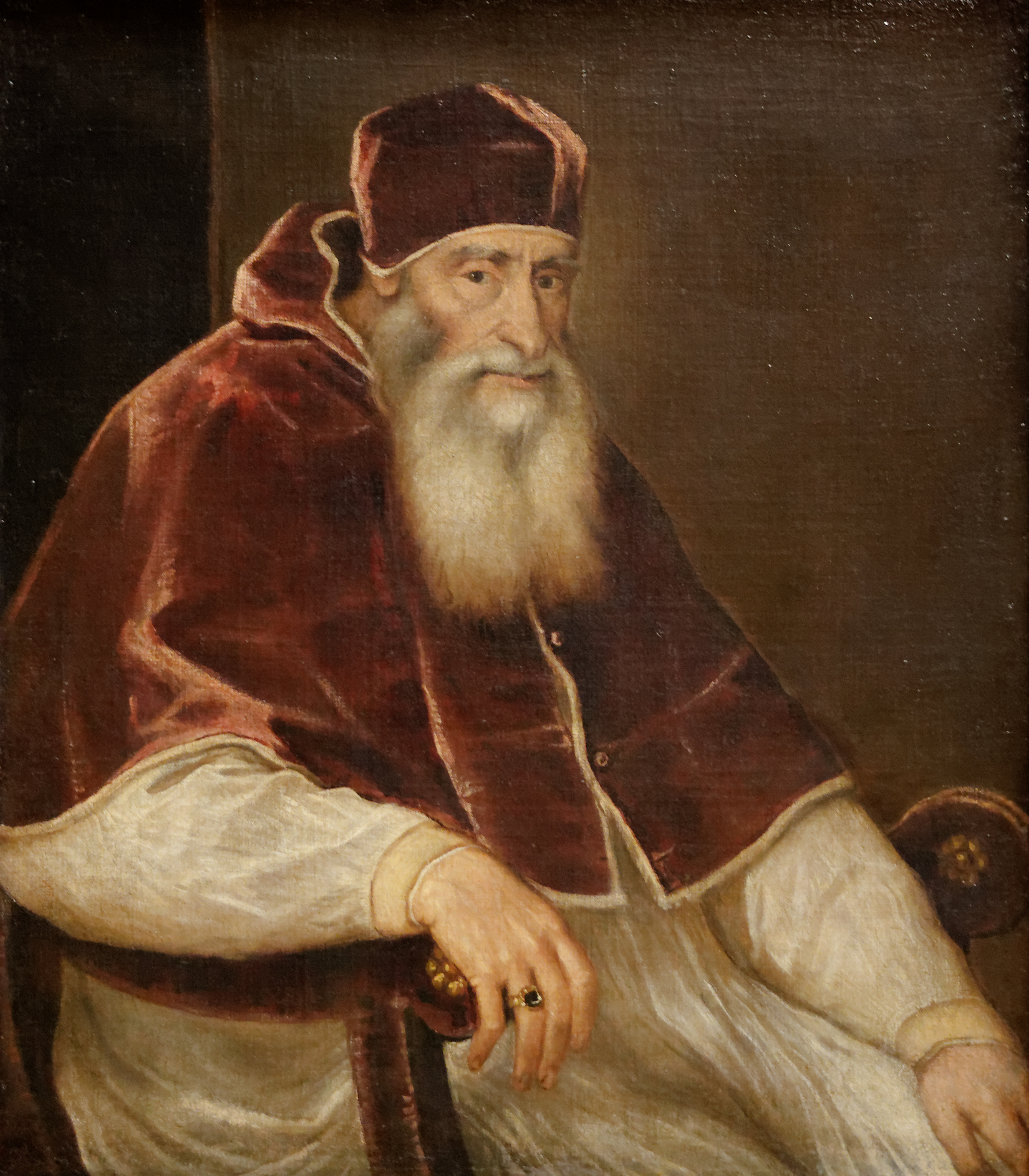 Alexandre Farnèse, Pape Paul III. École de Titien, après 1546. Kunsthistorisches Museum, Vienne (Autriche). Inv Nr GG99. Titien a réalisé une série de portraits de Paul III dont les originaux sont à Naples. Ce portrait, comme celui de l'Hermitage ou de Paris, sont des copies. Le modèle utilisé pour cette composition est le portrait du pape Jules II par Raphaël exposé à la London National Gallery